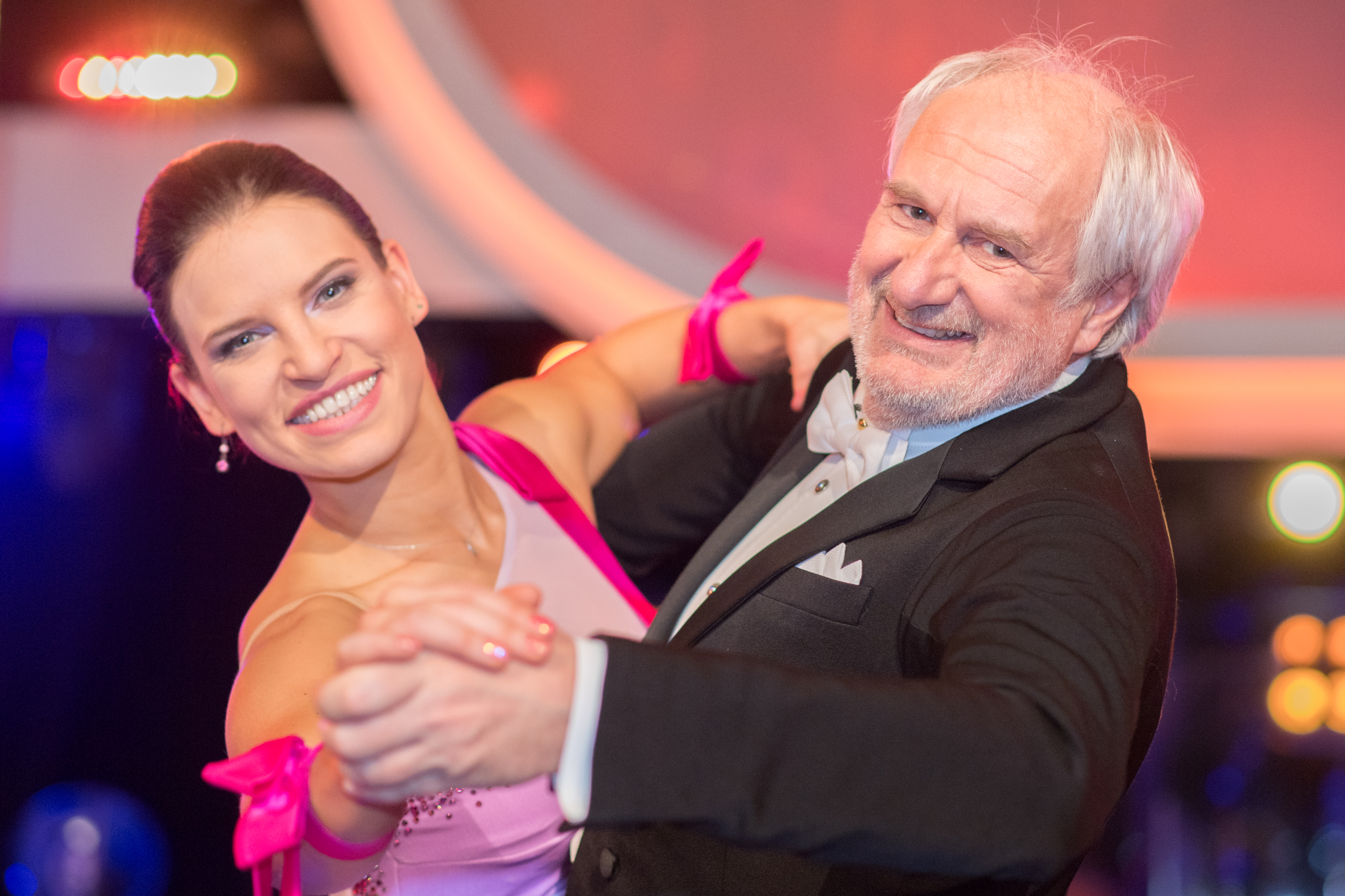 Wien, 15. März 2019: ORF Dancing Stars, 1. Folge - Bild zeigt Conny Kreuter und Michael Schottenberg